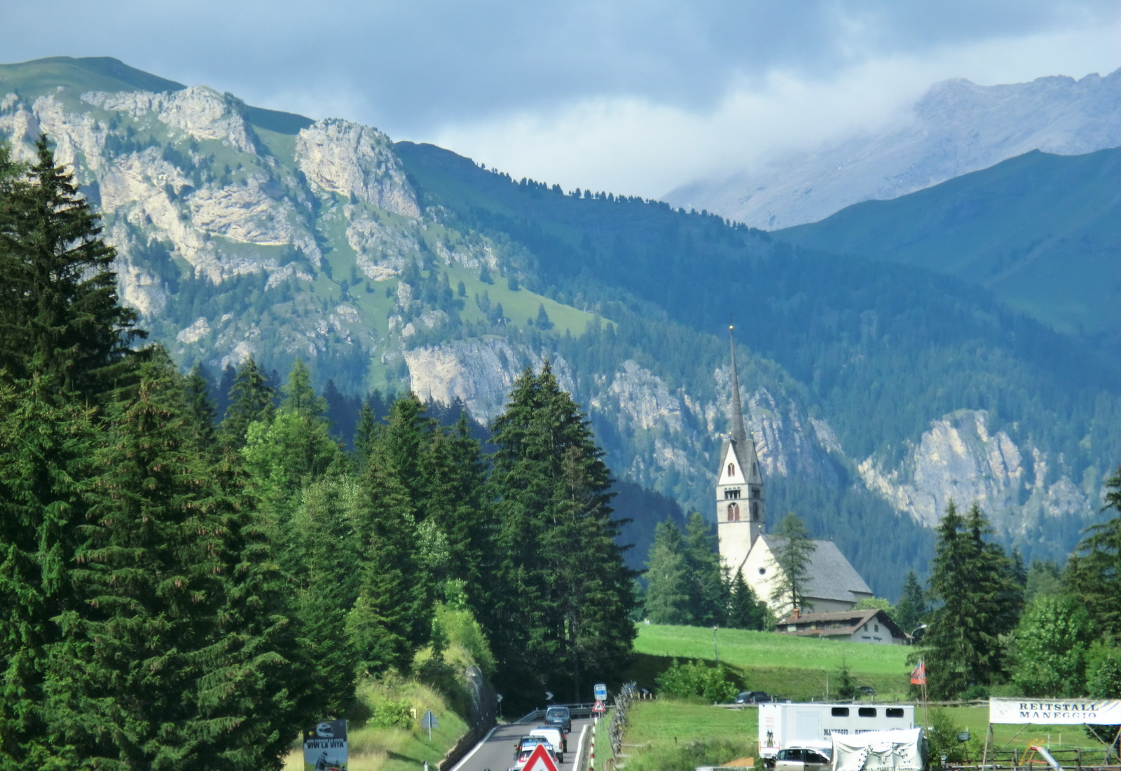 San Giovanni, Vigo di Fassa, Italy